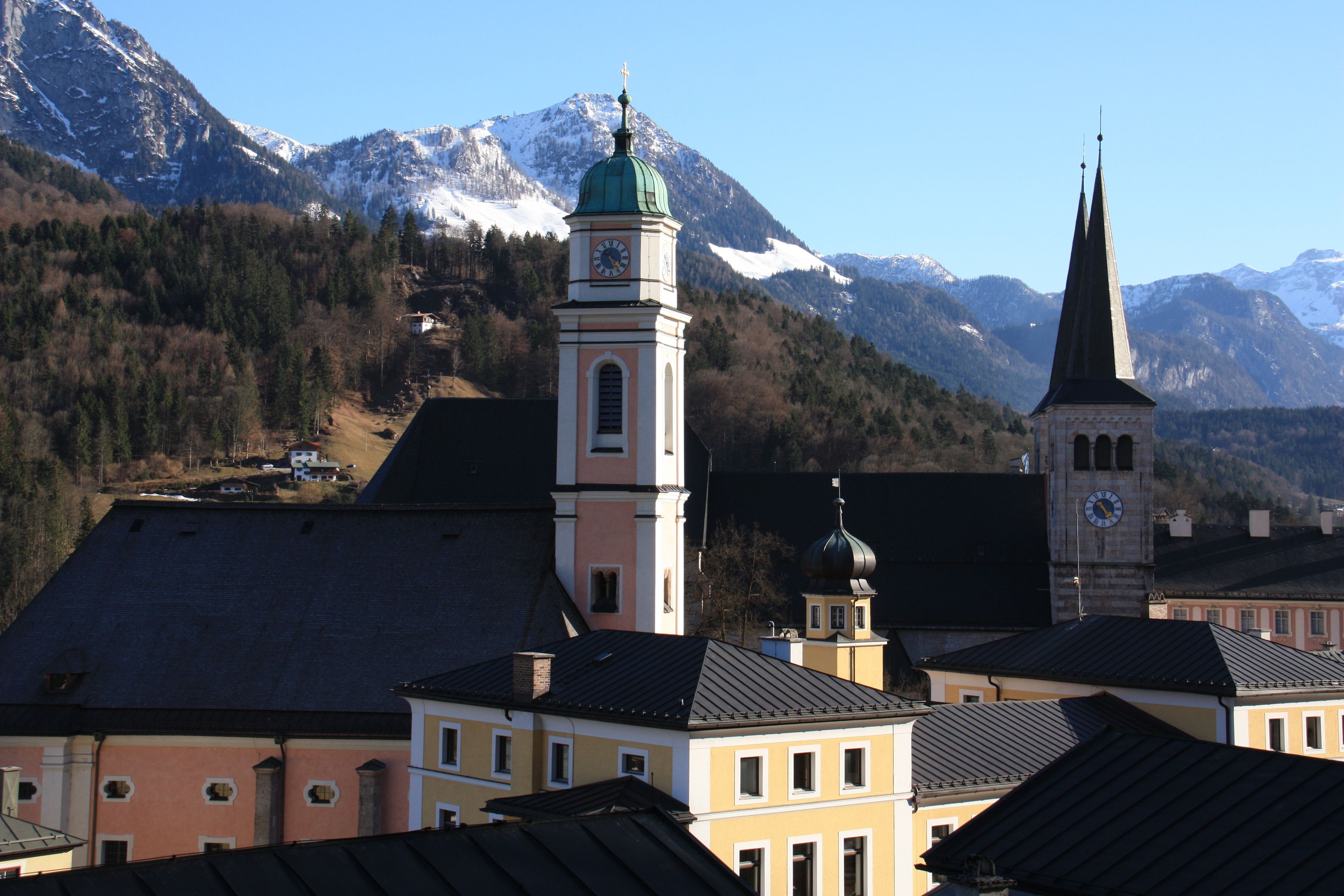 Stiftskirche und Pfarrkirche in Berchtesgaden, vom Fuße des Lockstein aus gesehen.